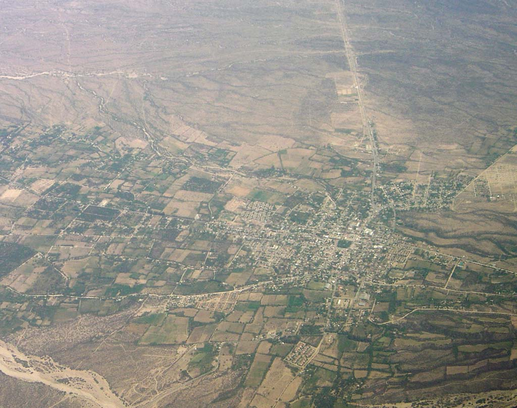 Vista aérea de la ciudad de Andalgalá / Aerial view of Andalgala